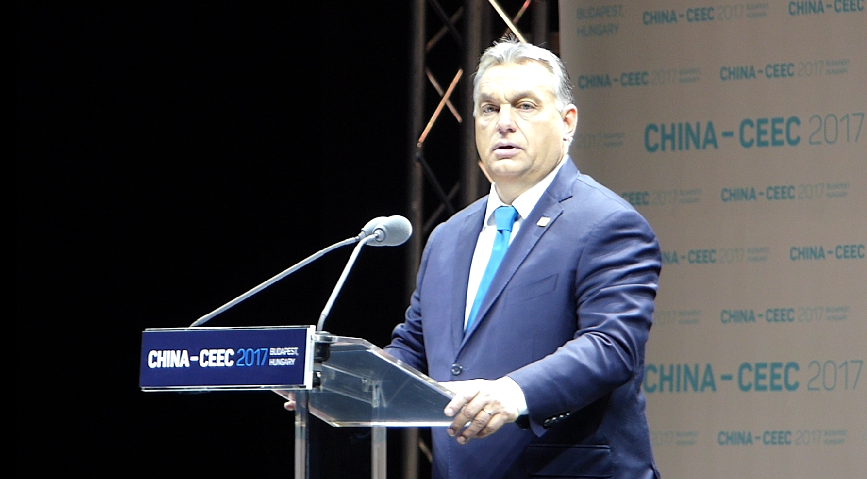 A felvétel 2017. november 27-én, hétfőn készült. A Kina-Kelet-Közép-Európai Üzleti Találkozón Orbán Viktor beszéde.